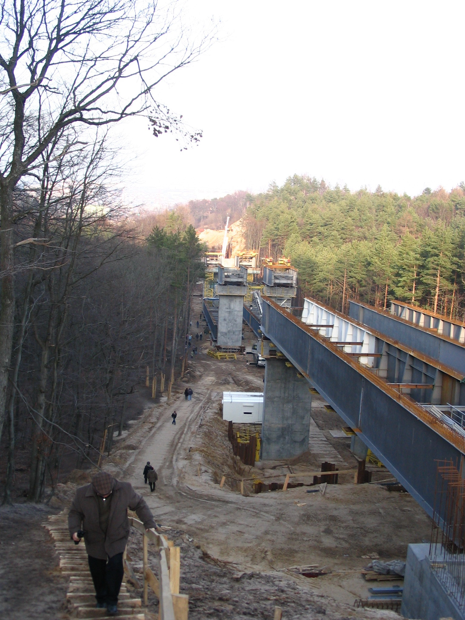 Trasa im. Eugeniusza Kwiatkowskiego, budowa III etapu, widok na wiadukt WD1 w kierunku Leszczynek. Zdjęcie wykonano 18 lutego 2007.